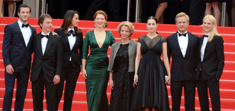 L'équipe du film "Saint-Laurent", en compagnie de la ministre de la culture Aurélie Filippetti, au festival de Cannes